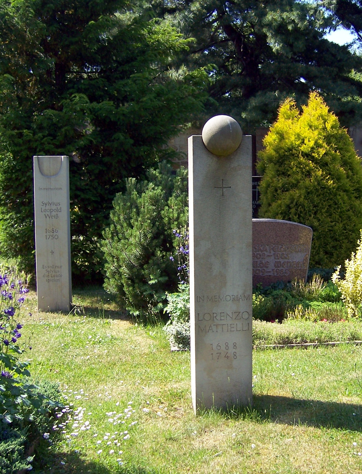 Gedenkstein für Lorenzo Mattielli auf dem Alten Katholischen Friedhof in Dresden. Sein Grabstein auf dem Friedhof ist nicht erhalten.